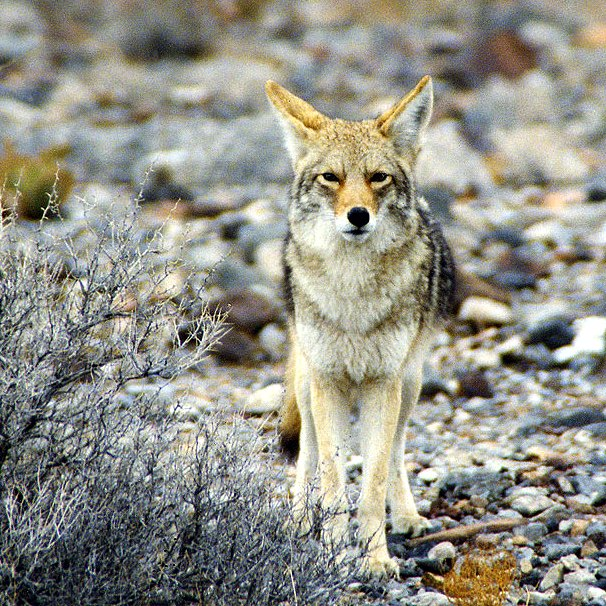 California Death Valley Coyote2